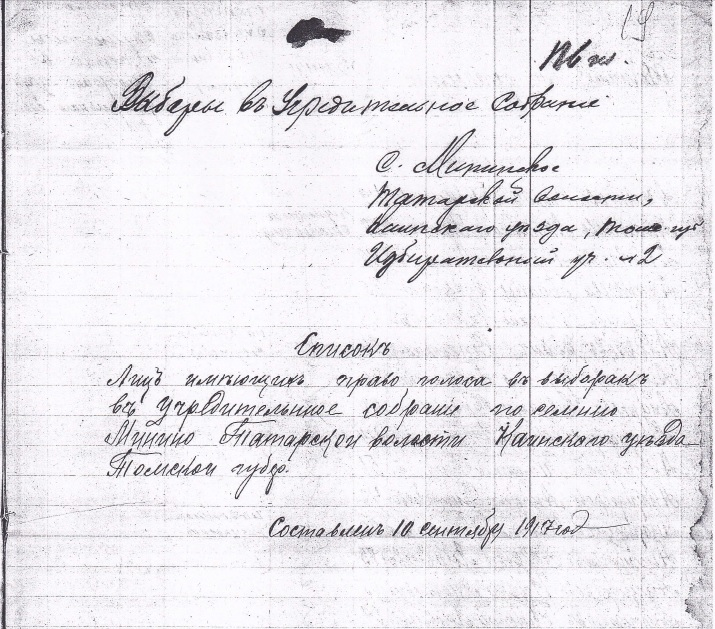 Первый лист избирательного списка лиц,имеющих право голоса в выборах в Учредительное собрание 1917 г.